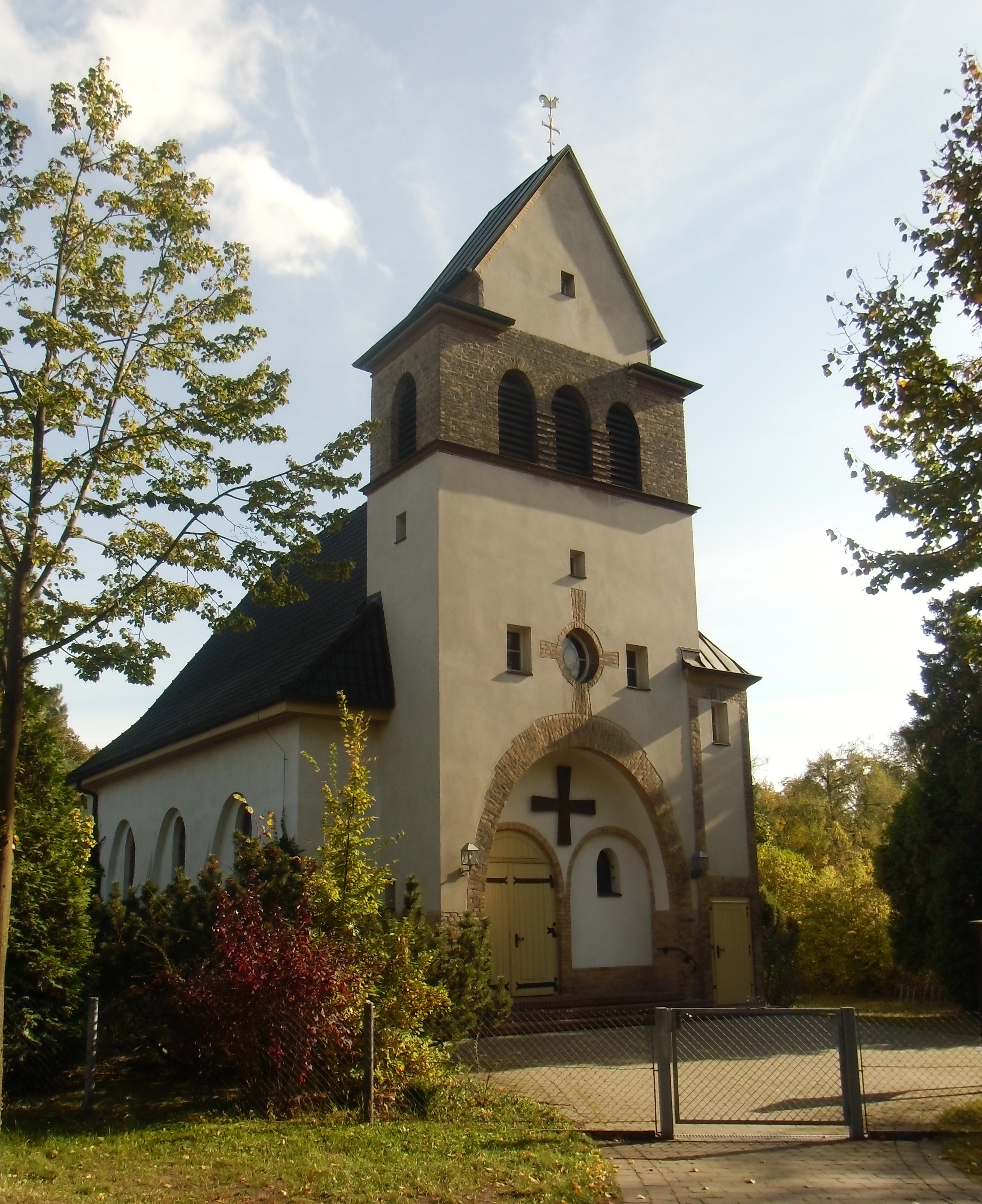 Denkmalgeschützte katholische Kirche St. Josef, Weinbergstraße 13, Nr. 46 in der Liste der Baudenkmale in Streausberg